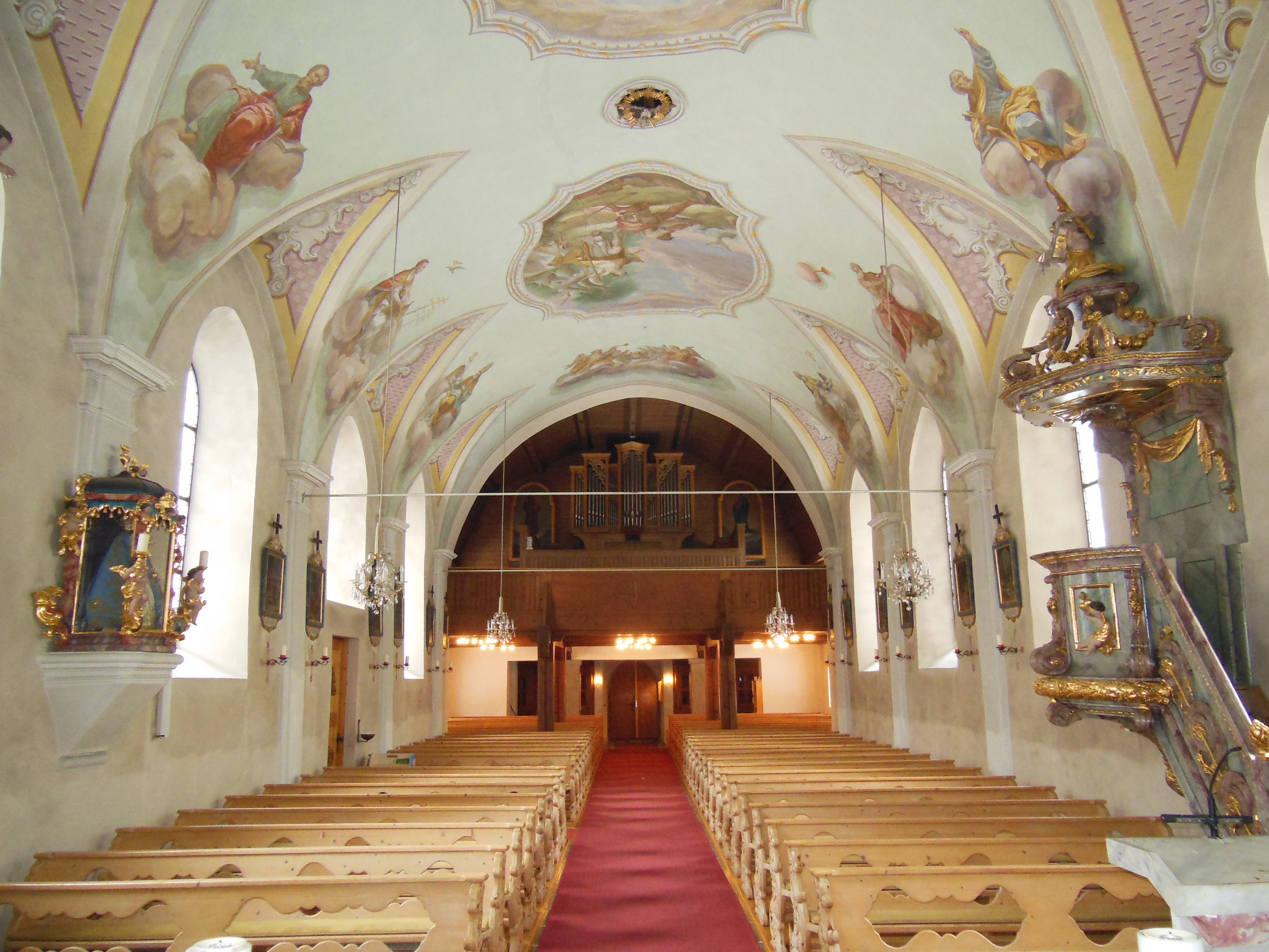 Kath. Pfarrkirche hl. Michael